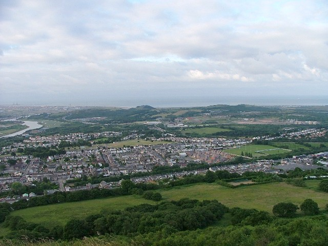 Skewen Original description: Skewen The largest village in Wales